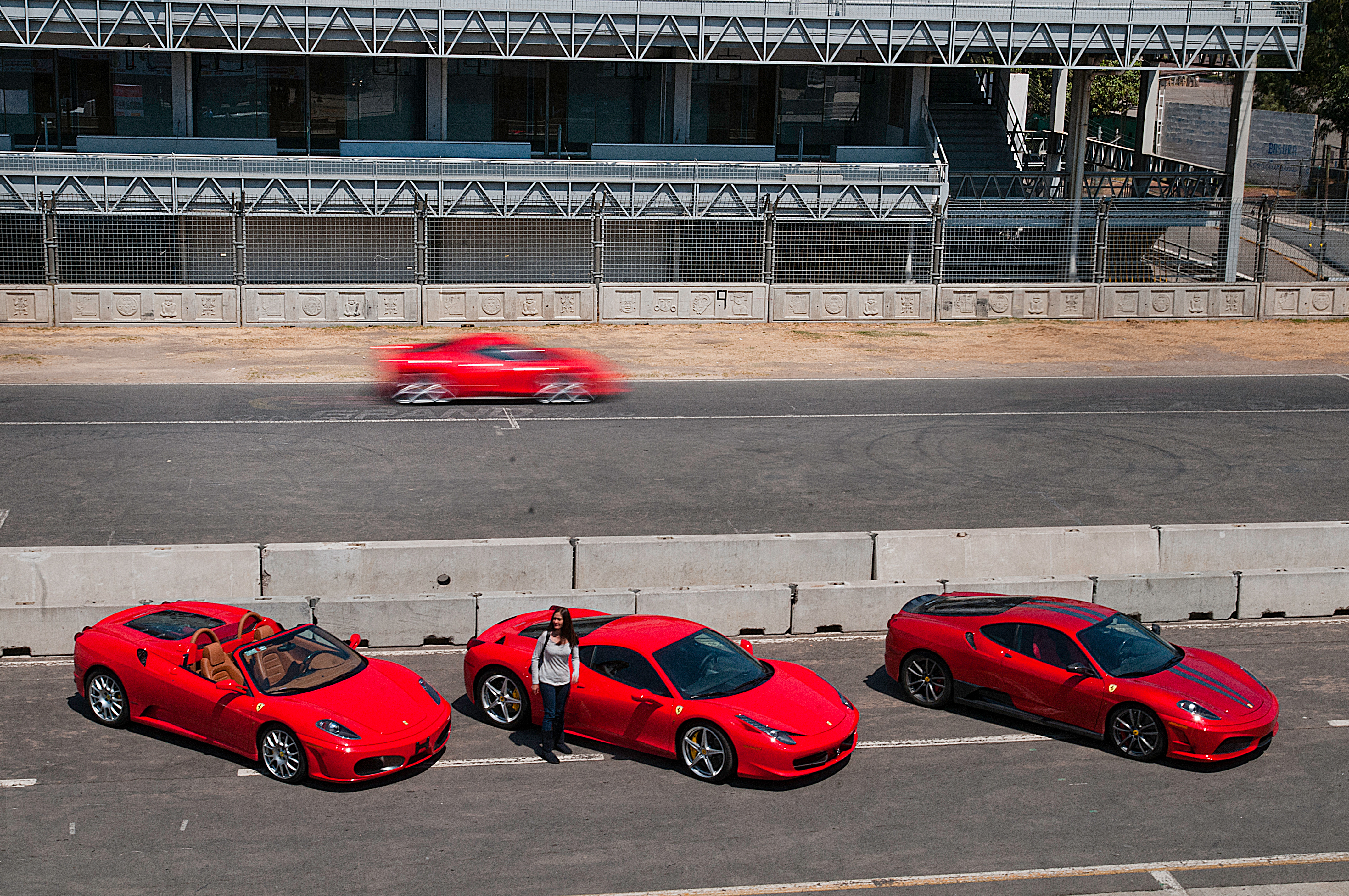 Ayer en el Autódromo Hermanos Rodríguez se juntaron los ferraris para echarse una carrerita. Cosas de este país...